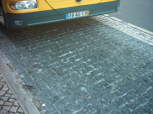 Pavimento (quase!) indeformável em calçada de granito.